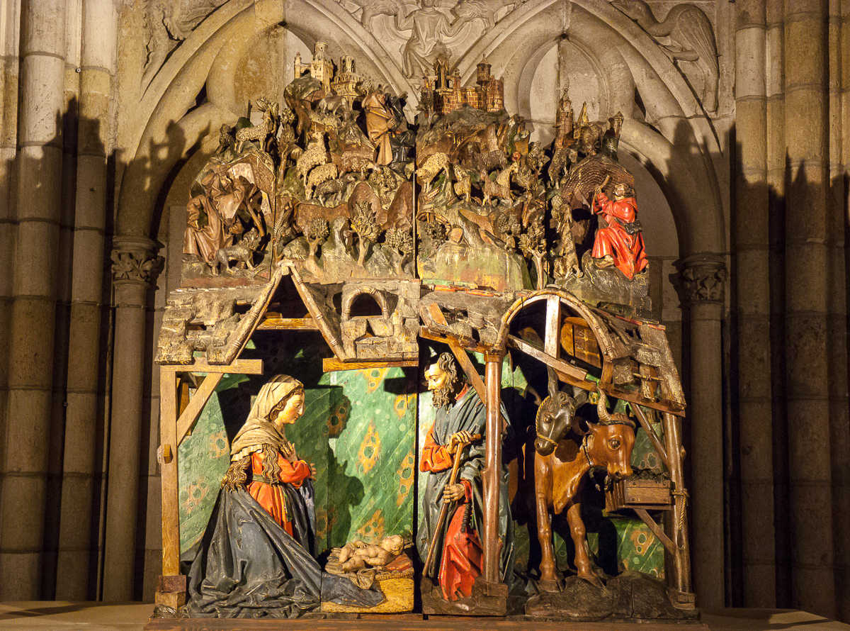 08082013 174607 LEÓN 0251